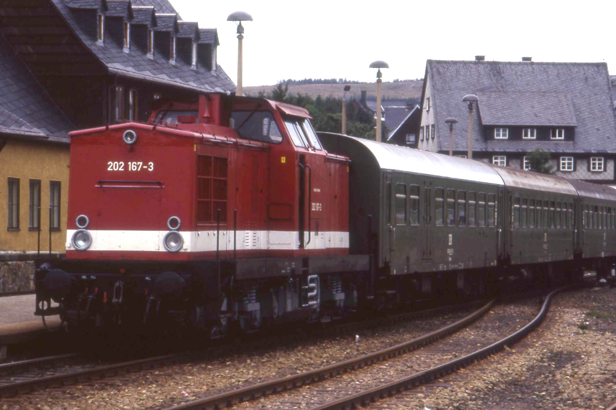 DR Class 202 former Class 112 in Altenberg, Erzgebirge August 1992